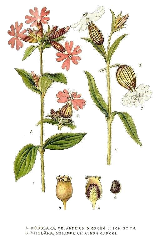 A. Silene dioica (L.) Clairv. B. Silene latifolia Poir. Original Description A. Rödblära, Melandrium dioecum (L.) Sch. et Th. B. Vitblära, Melandrium album Garcke.